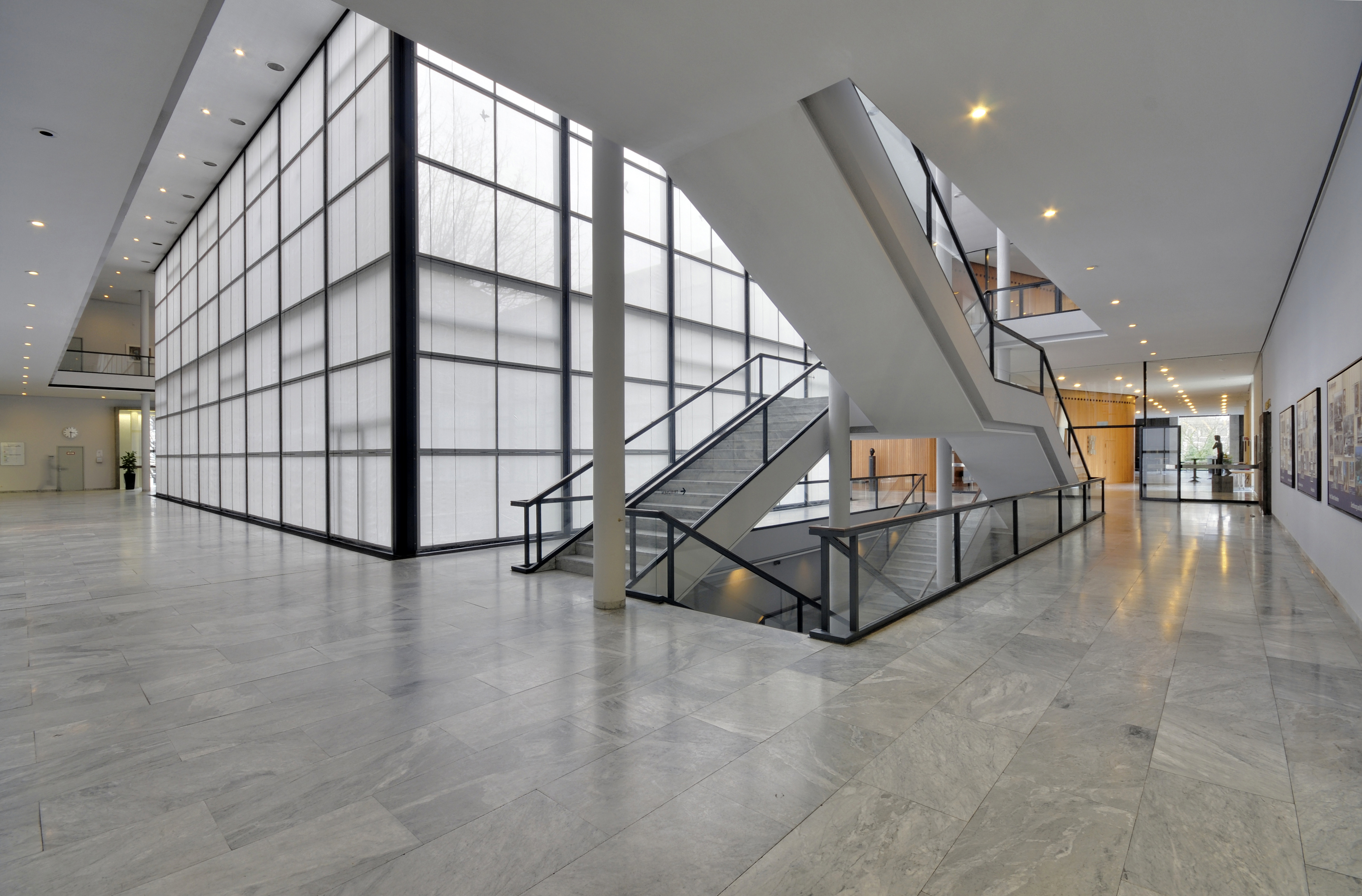 Landtag Niedersachsen, Hannover Wikipedia im Landtag – Niedersachsen 19. März 2013 in HannoverDieses Bild entstand während eines Fototermins im Niedersächsischen Landtagsgebäude in Hannover vor dem geplanten Abriß und Neubau bis 2017. Die Landtagsverwaltung hat uns gestattet, alle Räume zu dokumentieren.